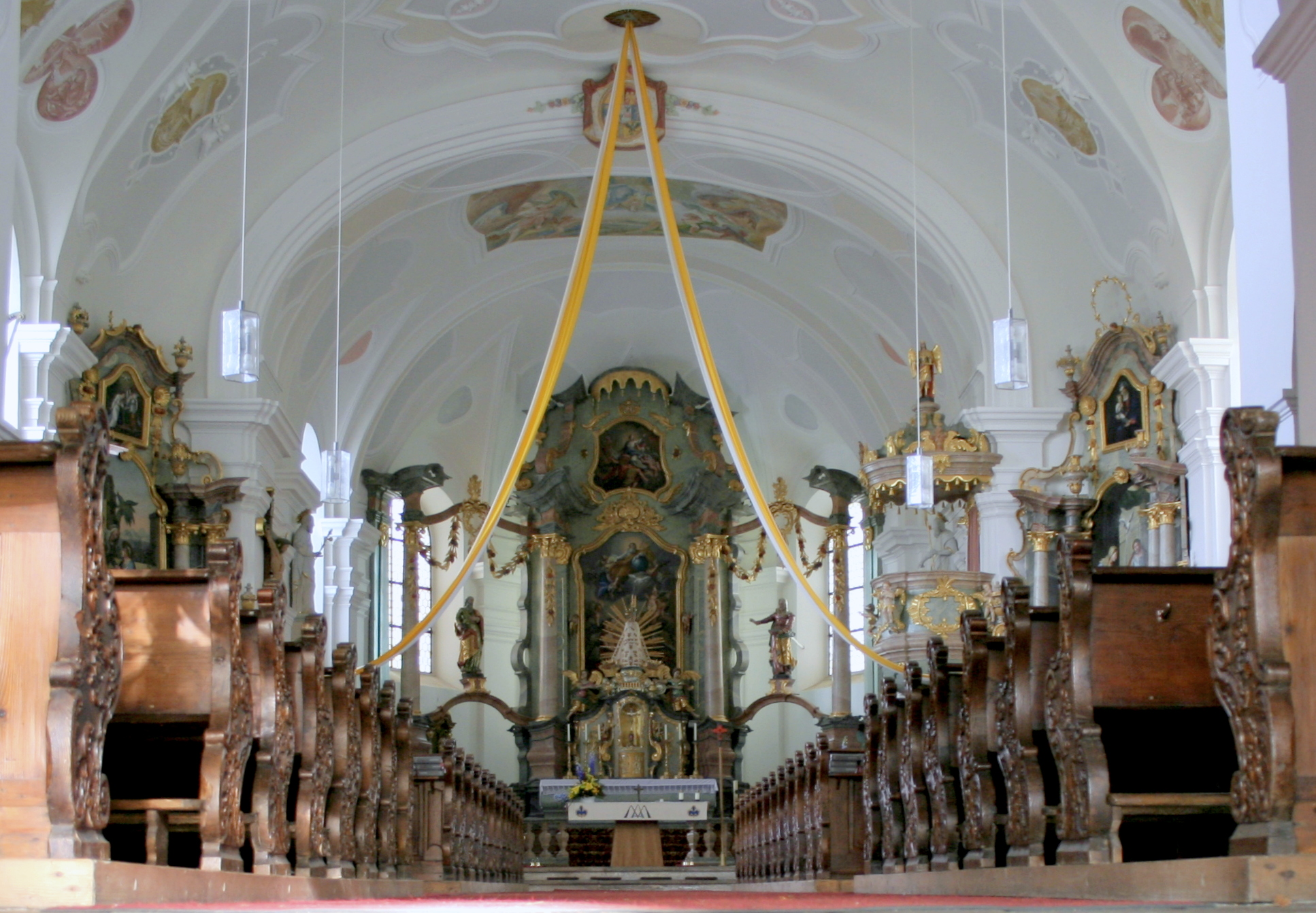 Baudenkmal Deutschland; Bayern; Oberpfalz; Neustadt a.d.Waldnaab, Waldthurn Oberfahrenberg Kath. Wallfahrtskirche Mariä Heimsuchung, Saalkirche mit eingezogenem, unregelmäßig geschlossenem Chor, 1775-79 von Johann Martin Beer, Flankenturm mit Spitzhelm 19. Jh.; mit Ausstattung; (D-3-74-165-31)This is a photograph of an architectural monument.